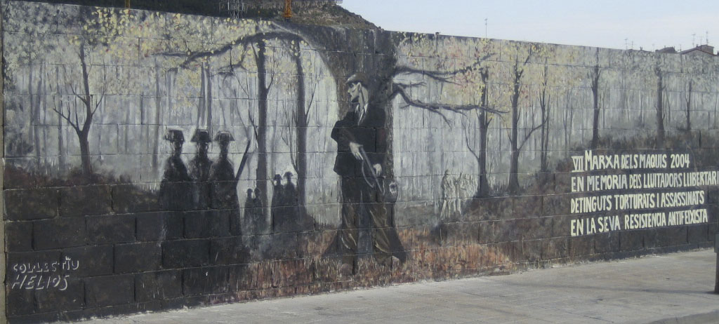 Maquis llibertaris